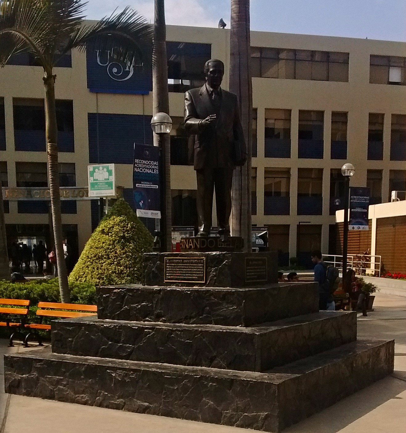 Estatua de Belaunde